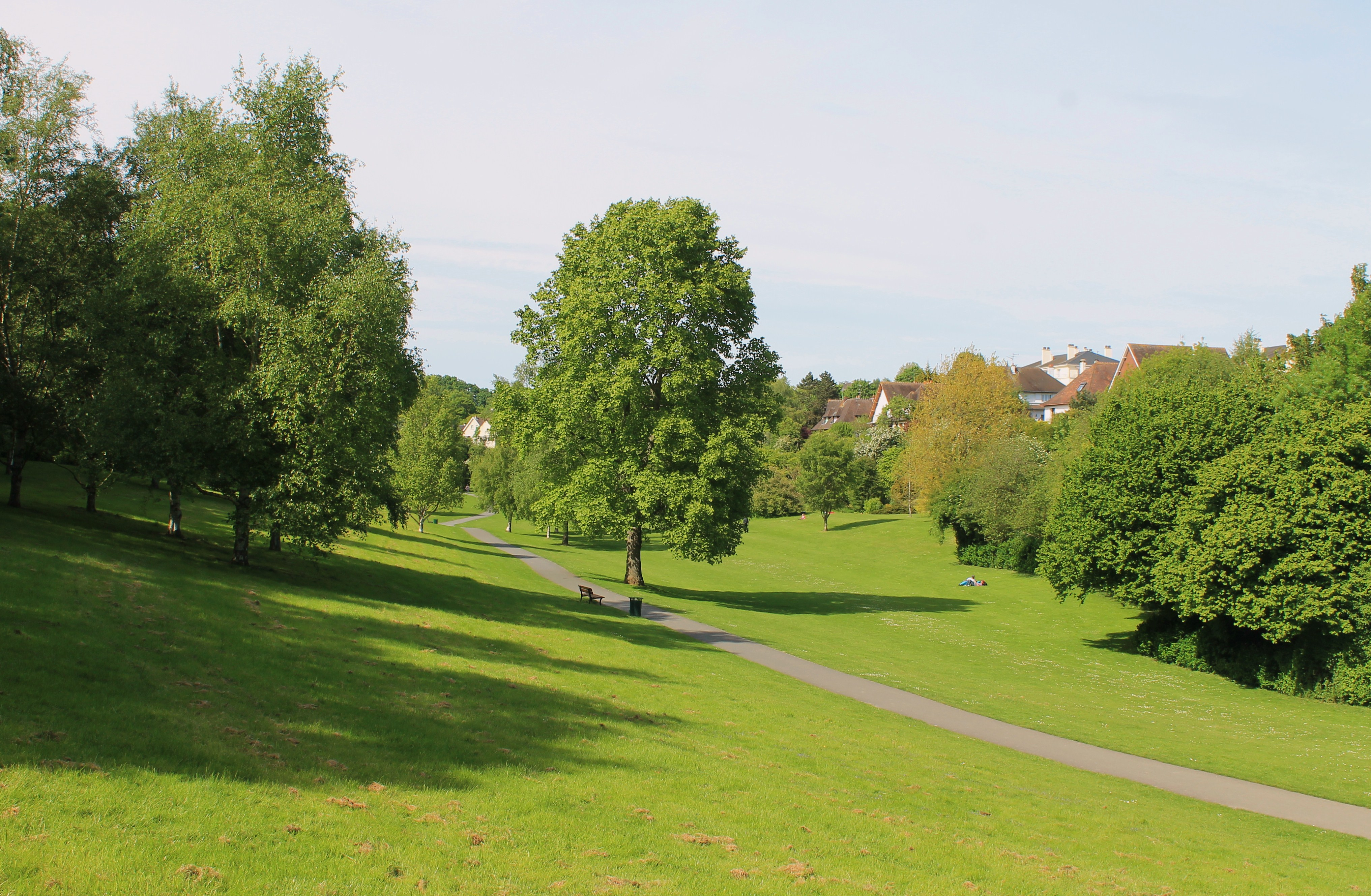 La Vallée des Jardins, espace vert de Caen (Calvados)